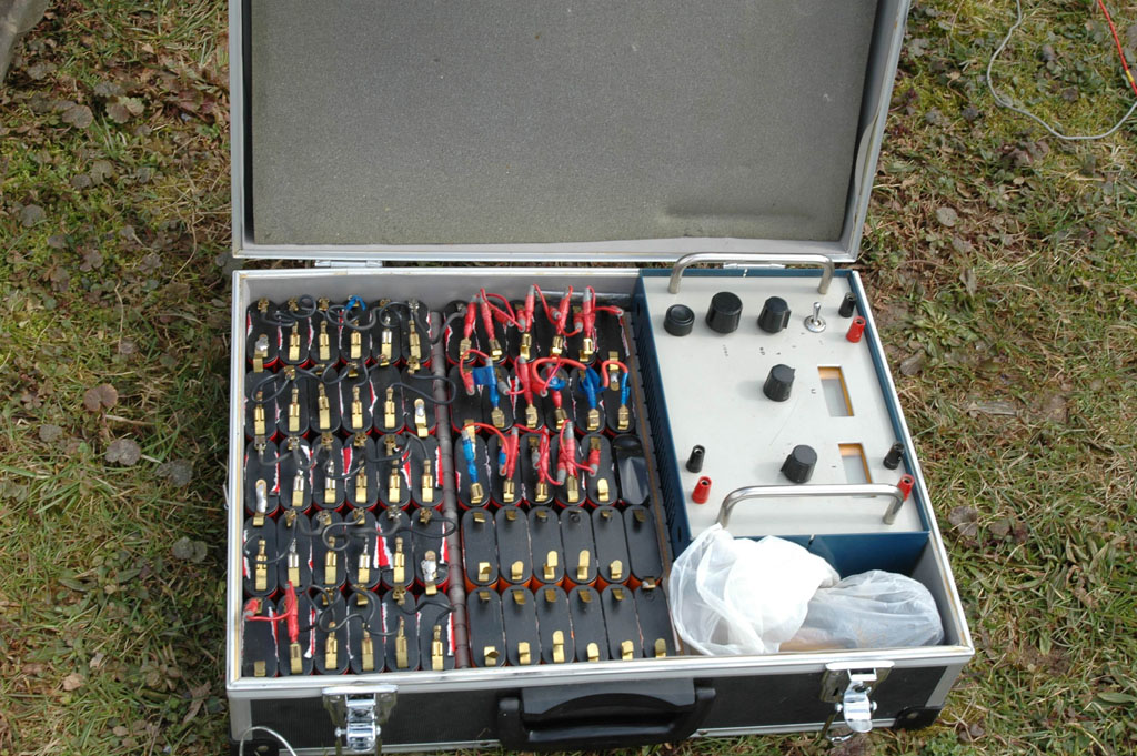 Izvor napajanja